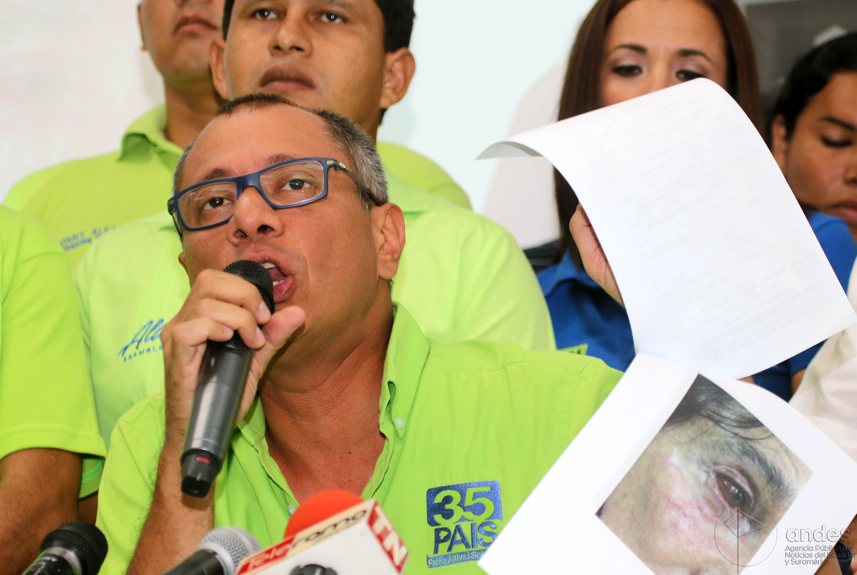 Guayaquil, lunes 13 de febrero del 2017 (Andes).-En rueda de prensa Jorge Glas candidato a la vicepreisdencia de la república rechazó la campaña sucia de la oposición. Foto:Andes/César Muñoz